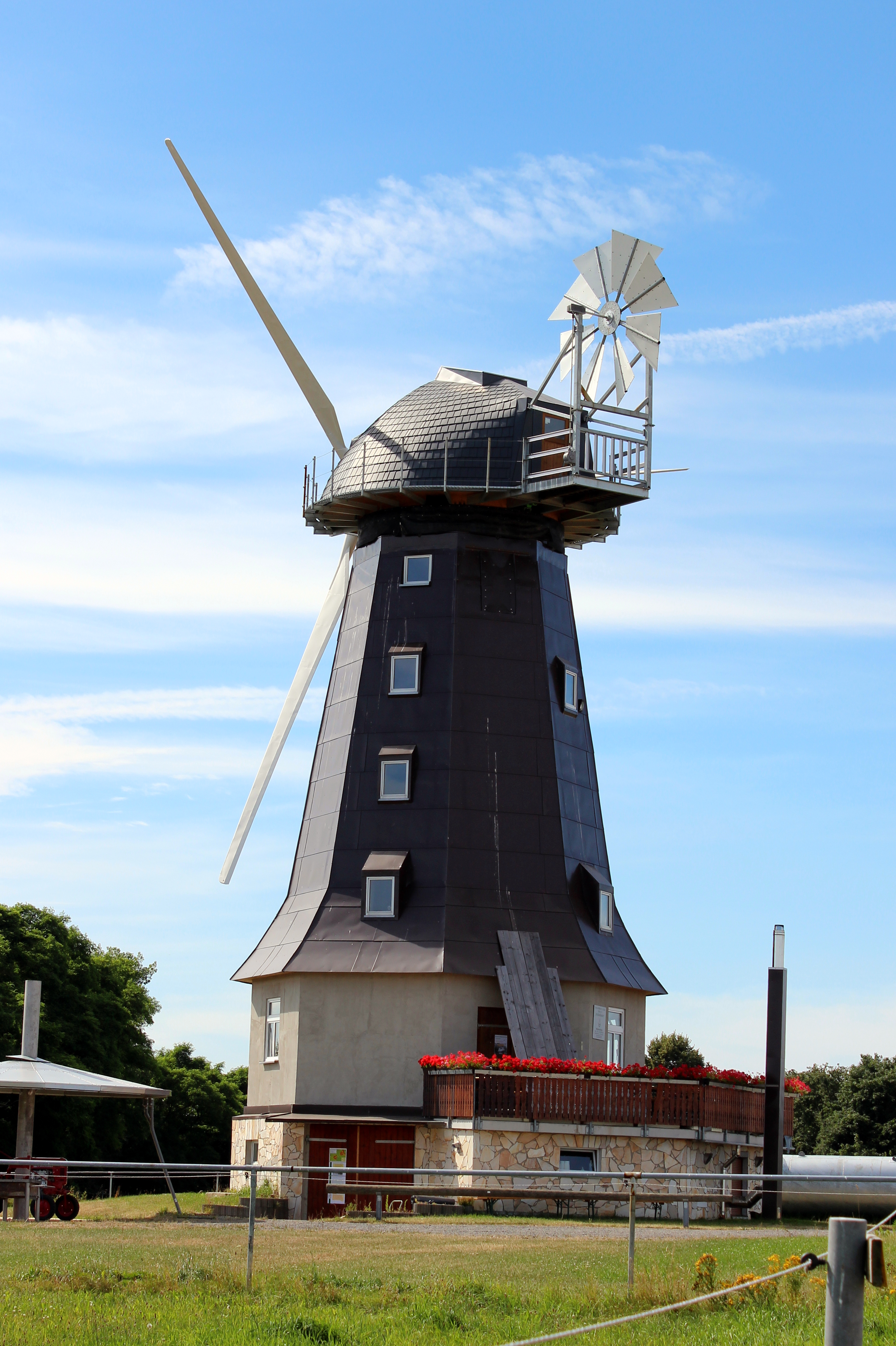 Neuholländermühle im Bornaer Ortsteil Wyhra